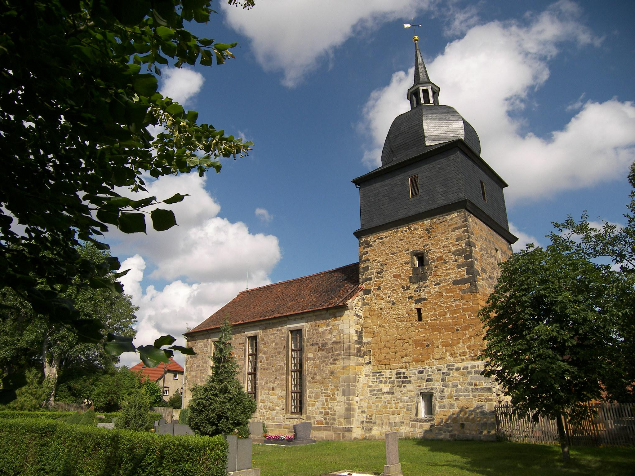 Grabsleben_Großrettbach-Kirche-Blick_von-Suedost